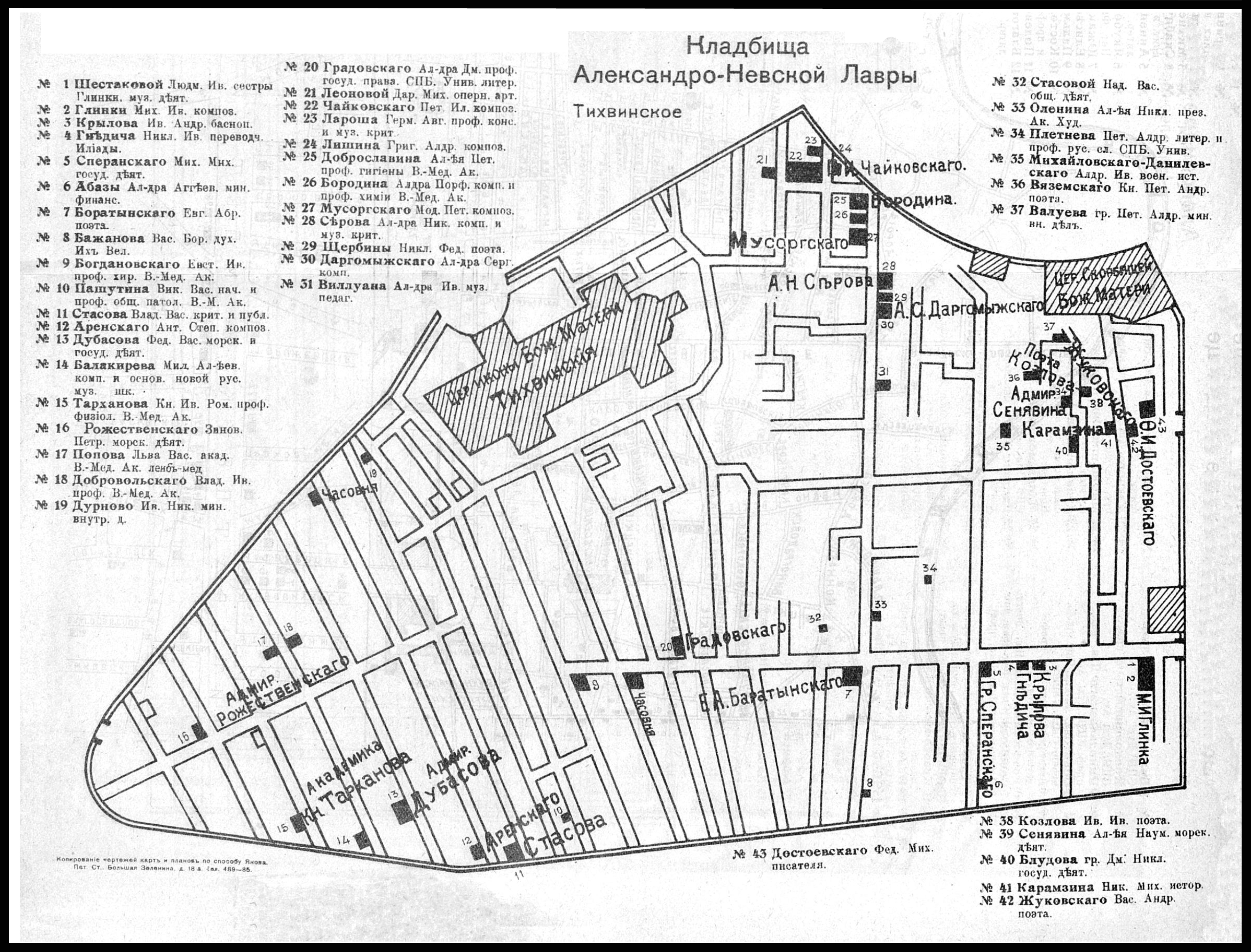 План Тихвинского кладбища Александро-Невской лавры, 1914 год